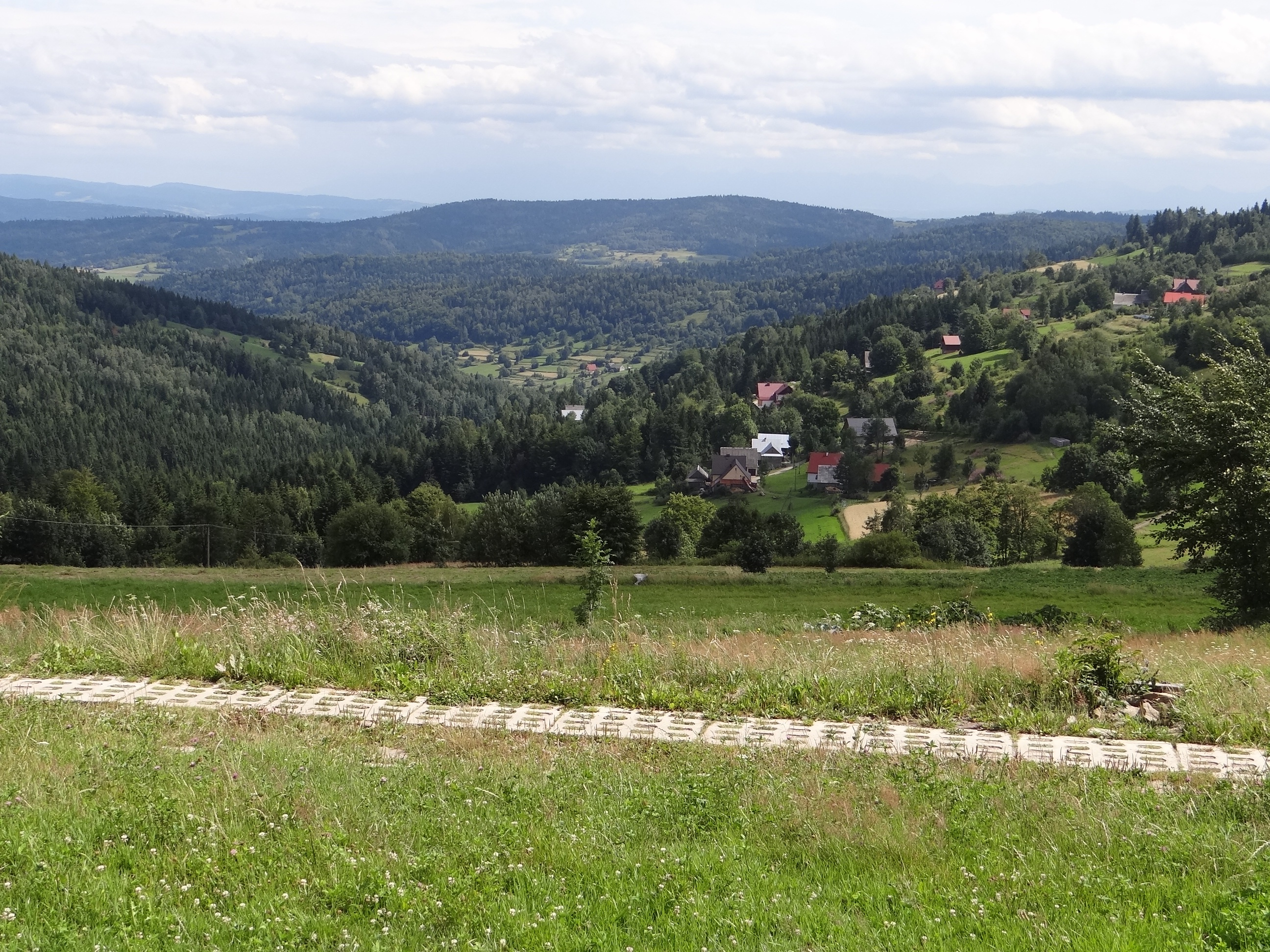 Zembalowa i dolina potoku Bogdanówka. Widok z Koskowej Góry